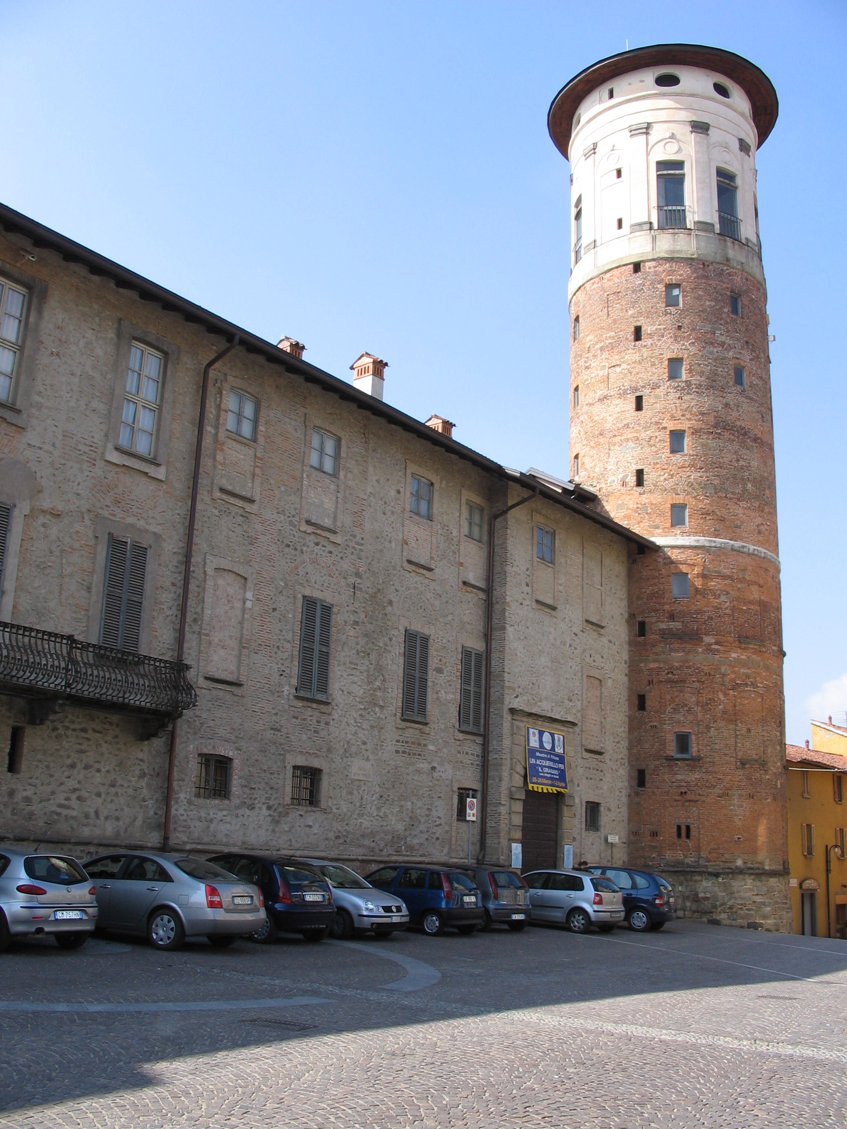 Autore Giorces. Palazzo Prinetti.